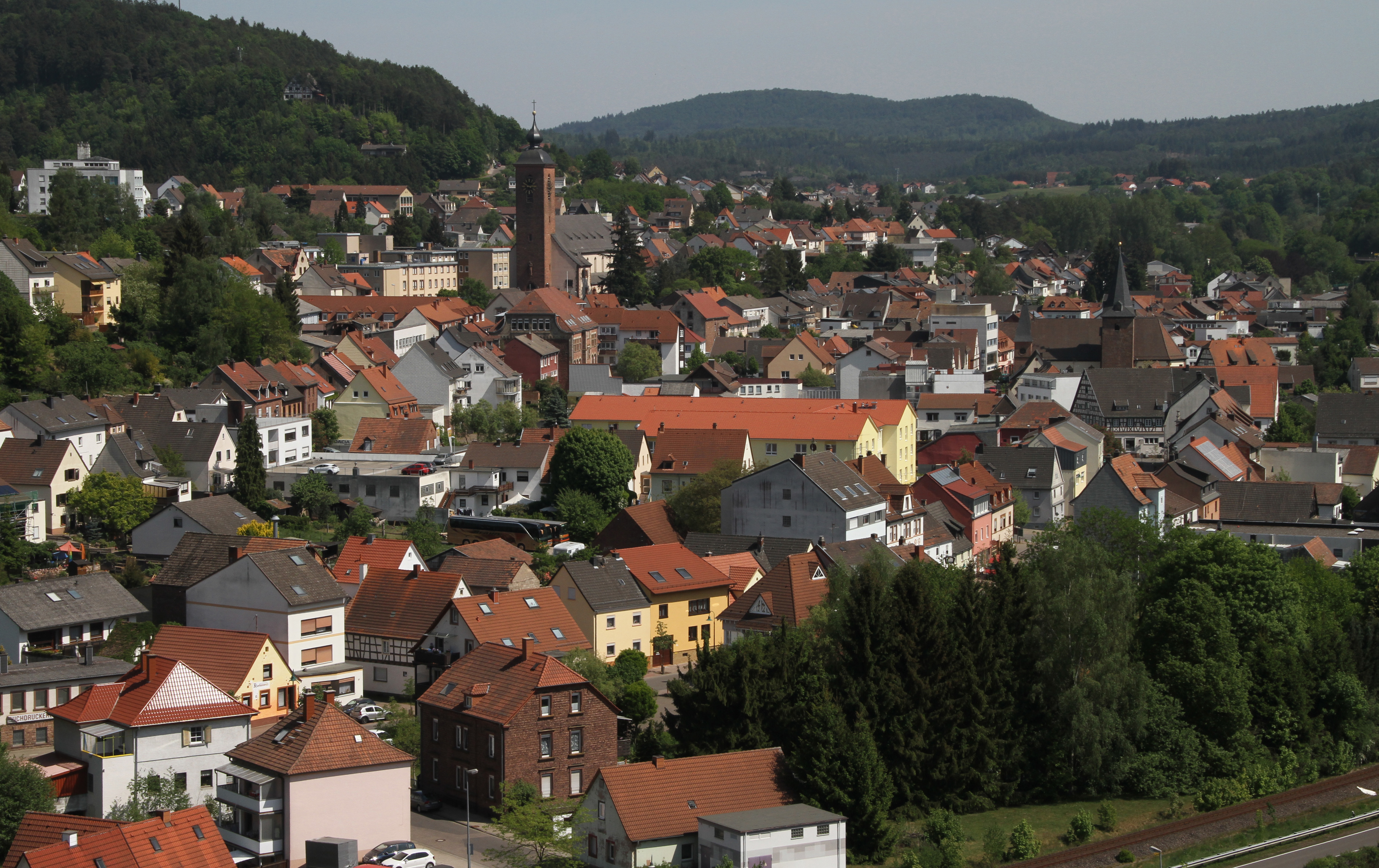 Rodalben, Stadt im Landkreis Südwestpfalz. Blick von der alten Burg.